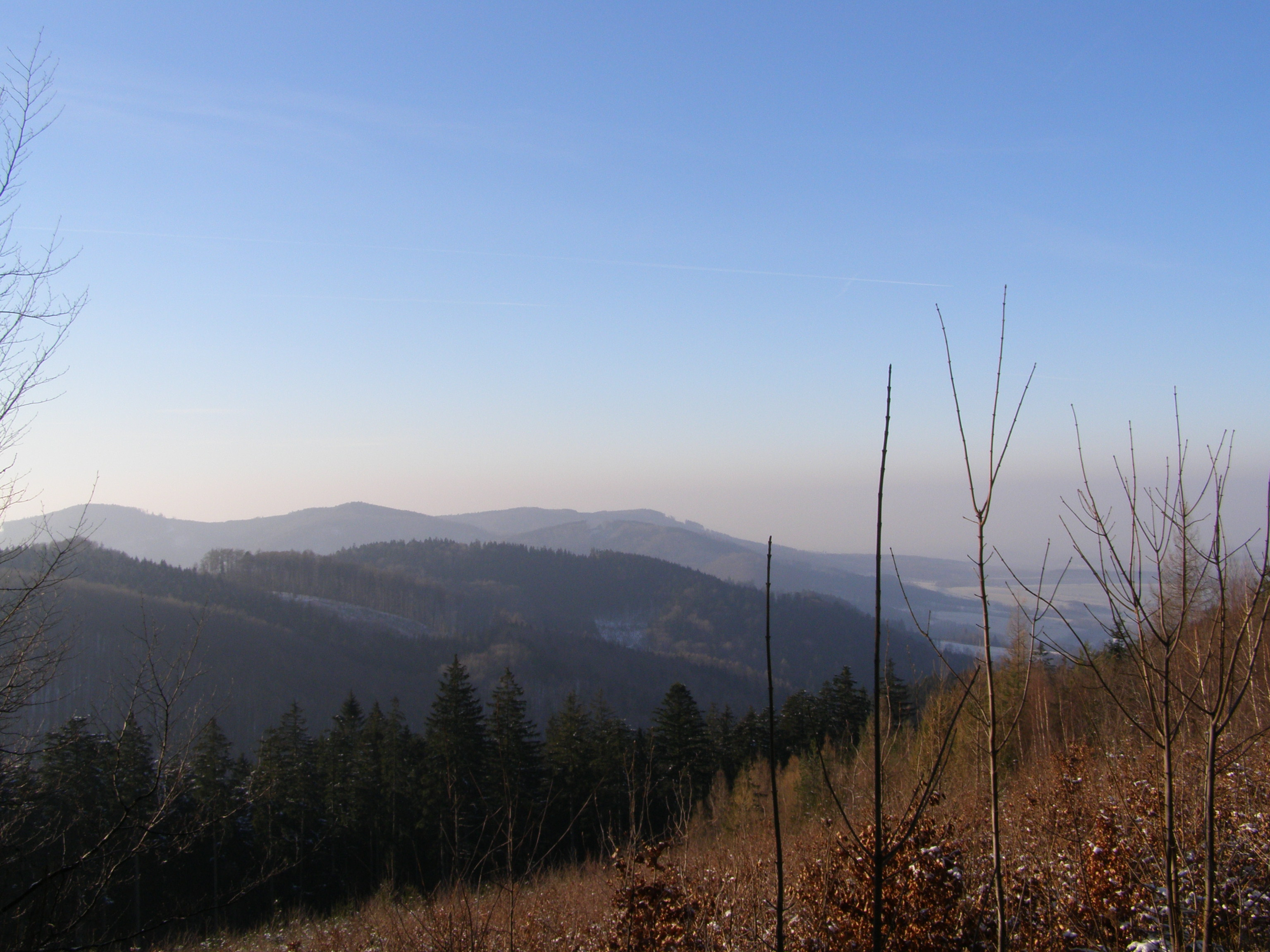 Hostýnské vrchy, Rusavská hornatina, výhled z jihozápadního úbočí Hostýna